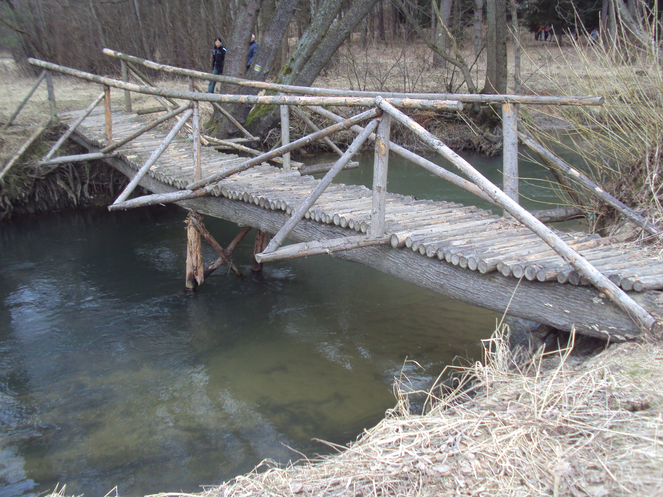 Lávka přes Ploučnici u obce Hradčany, přechod žlutou trasou KČT